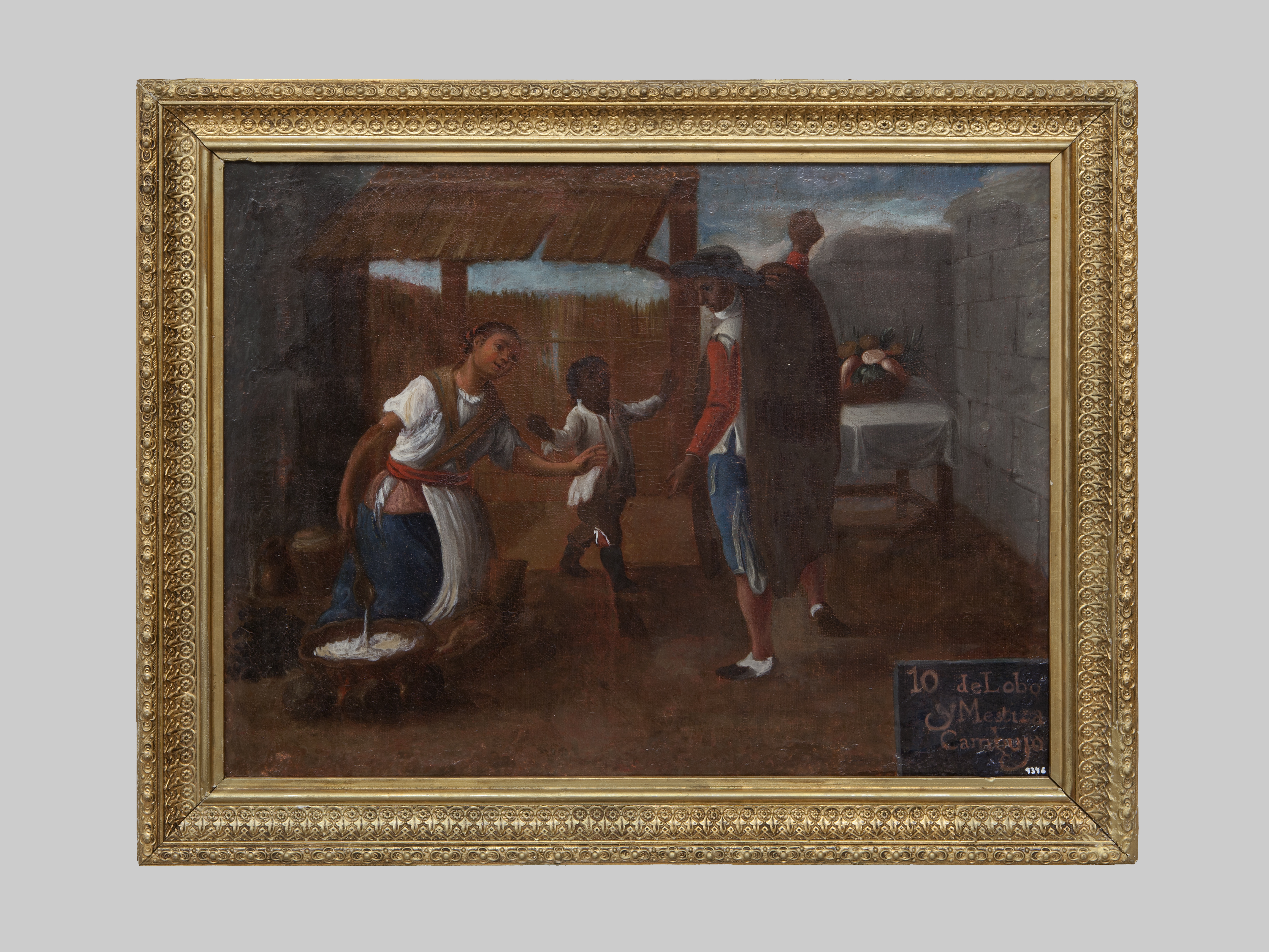 "10. De Lobo y Mestiza, Cambujo". pintura sobre tela. Biblioteca Museu Víctor Balaguer